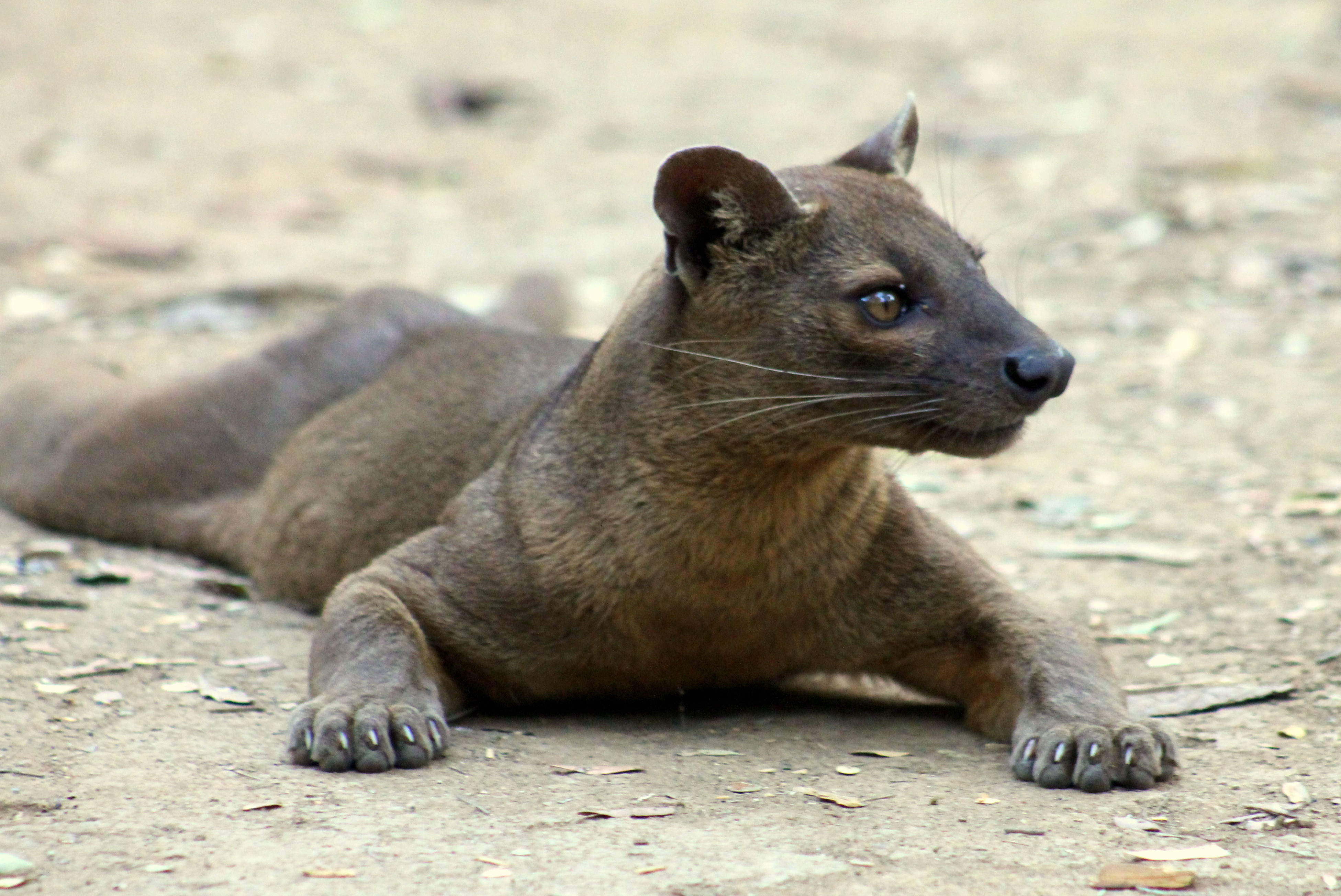 Fossa in Kirindy